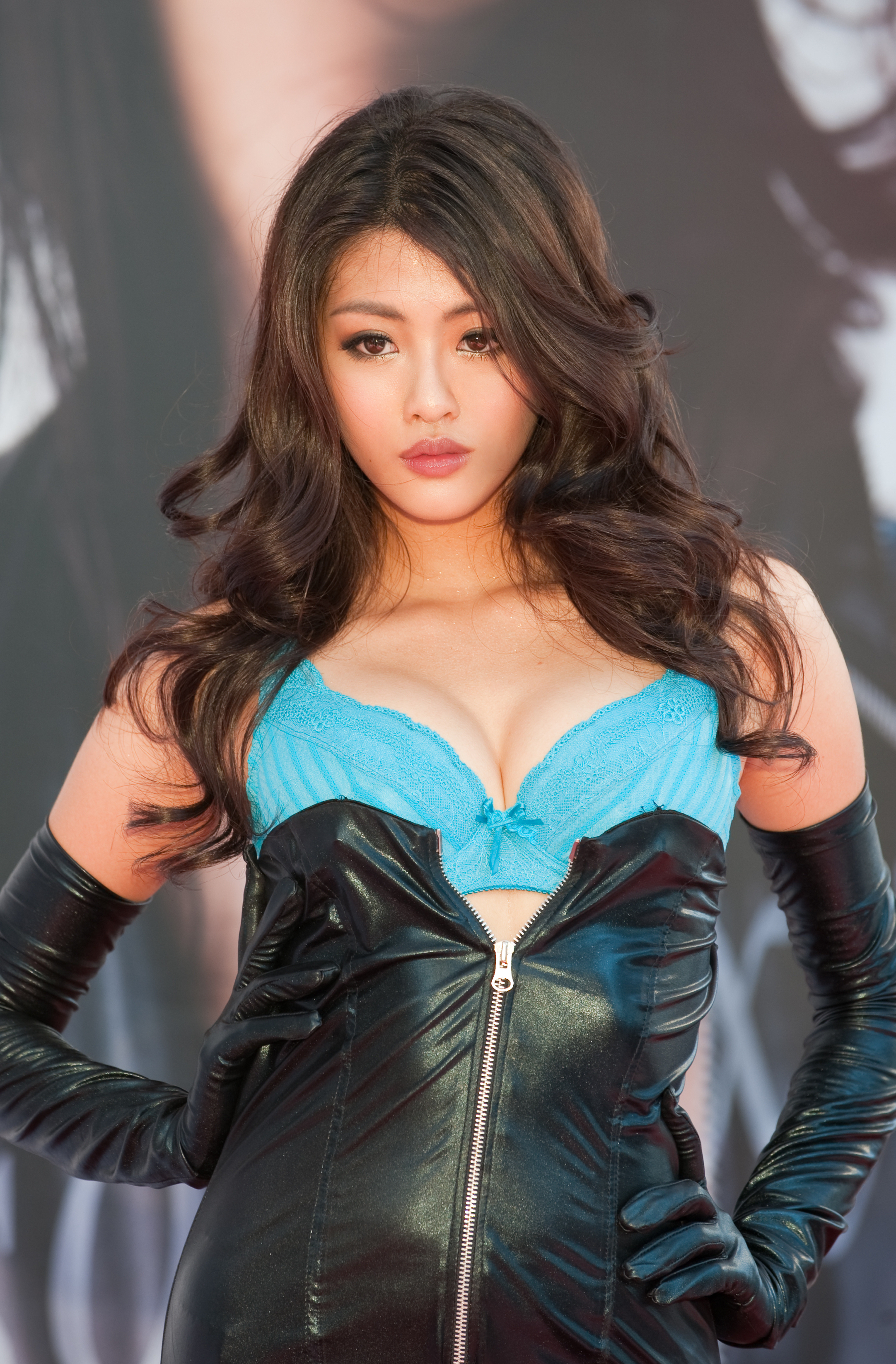 賴琳恩出席思薇爾內衣新品發表會。